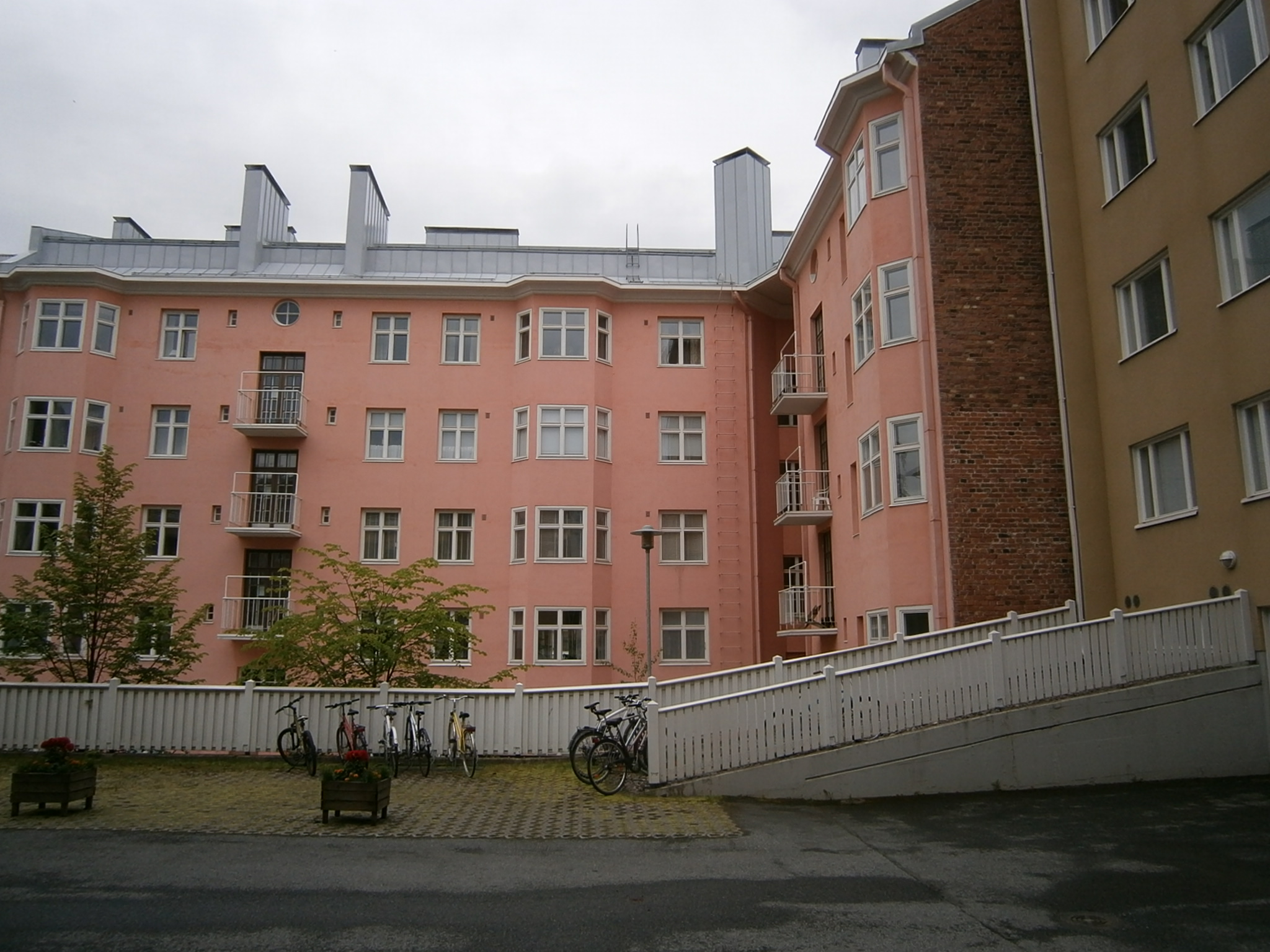 Kerrostalo Kuopiossa